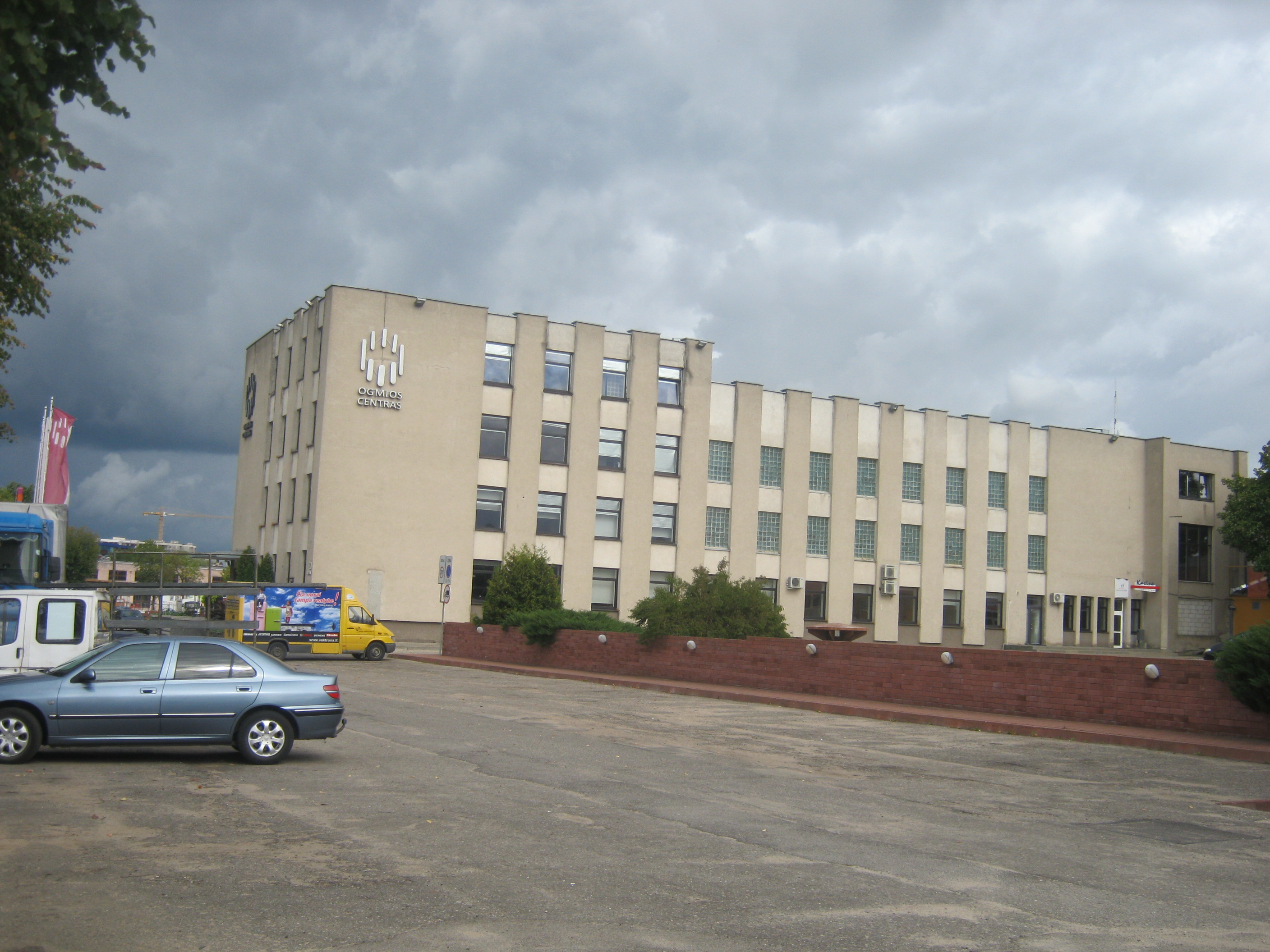 Vilnius